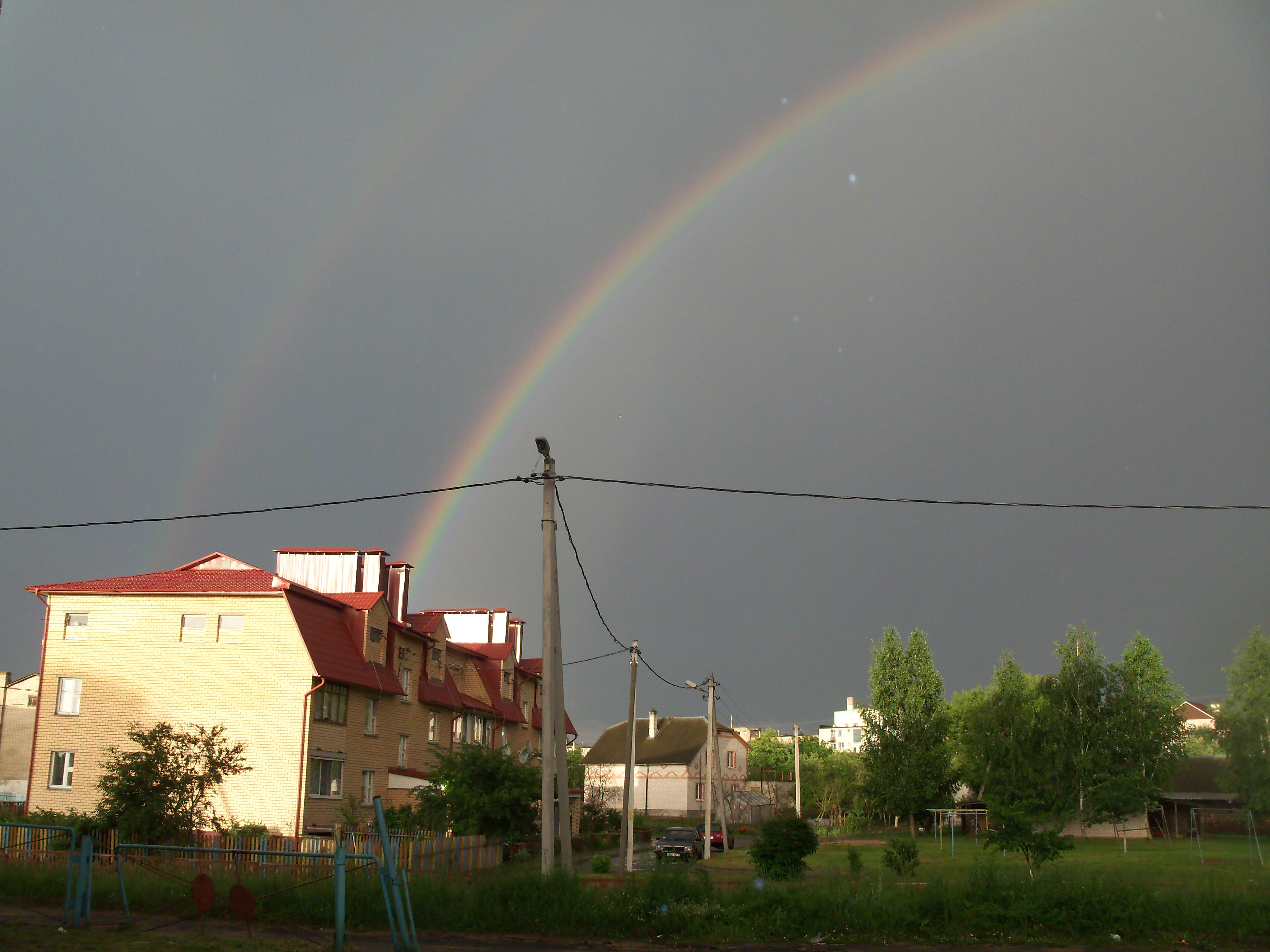 аорпаорп т